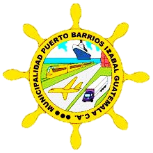 Escudo